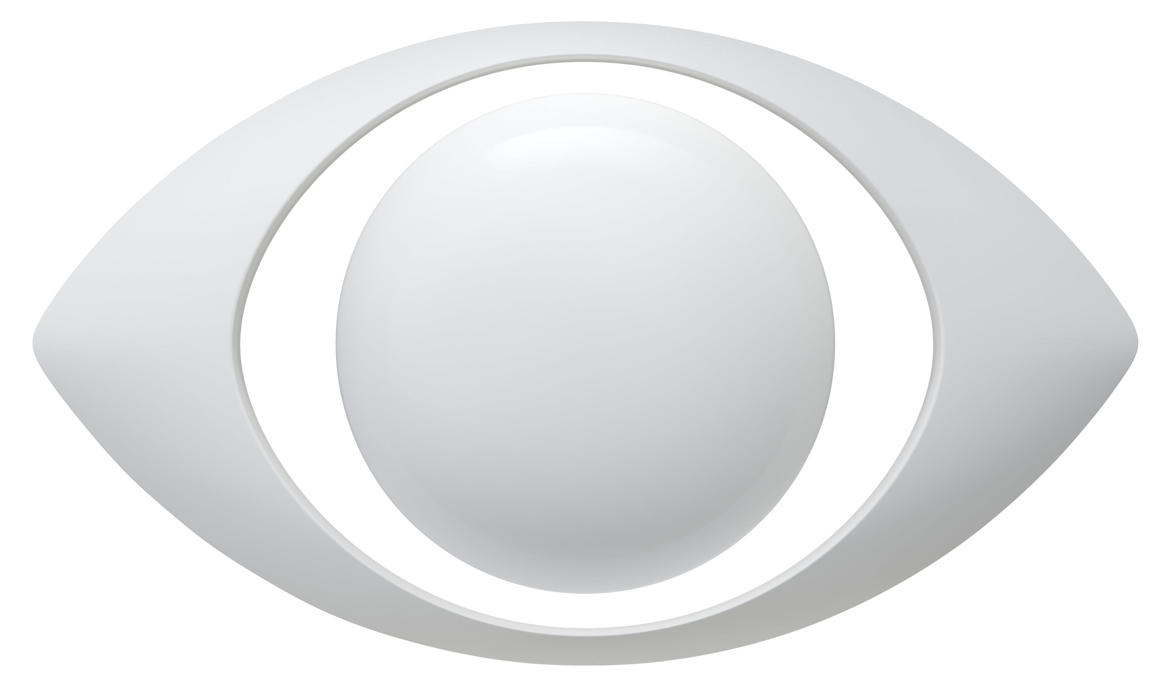 Logo da TV Bandeirantes 2019 versão Colorida